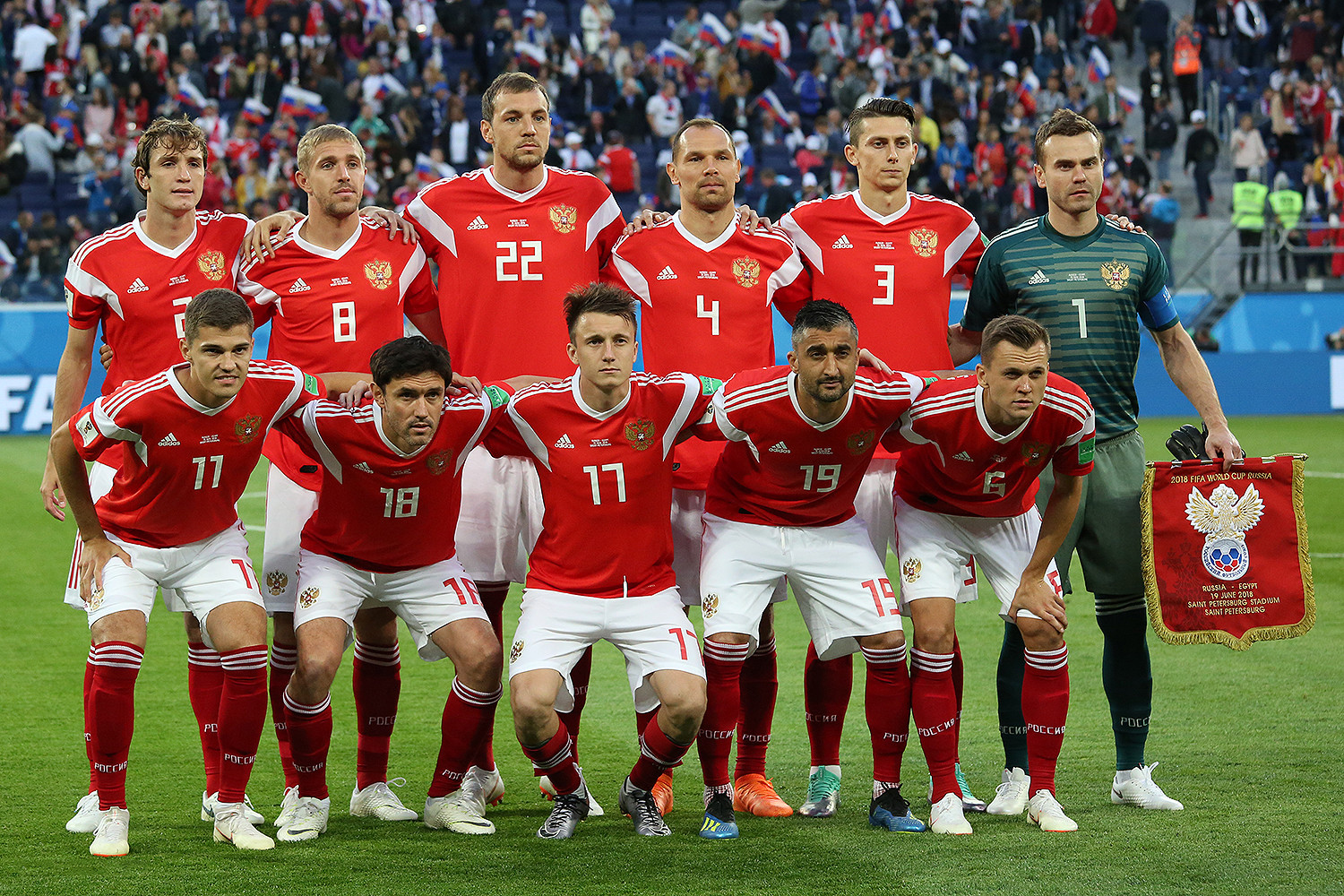 Историческая победа сборной России в матче с Египтом!